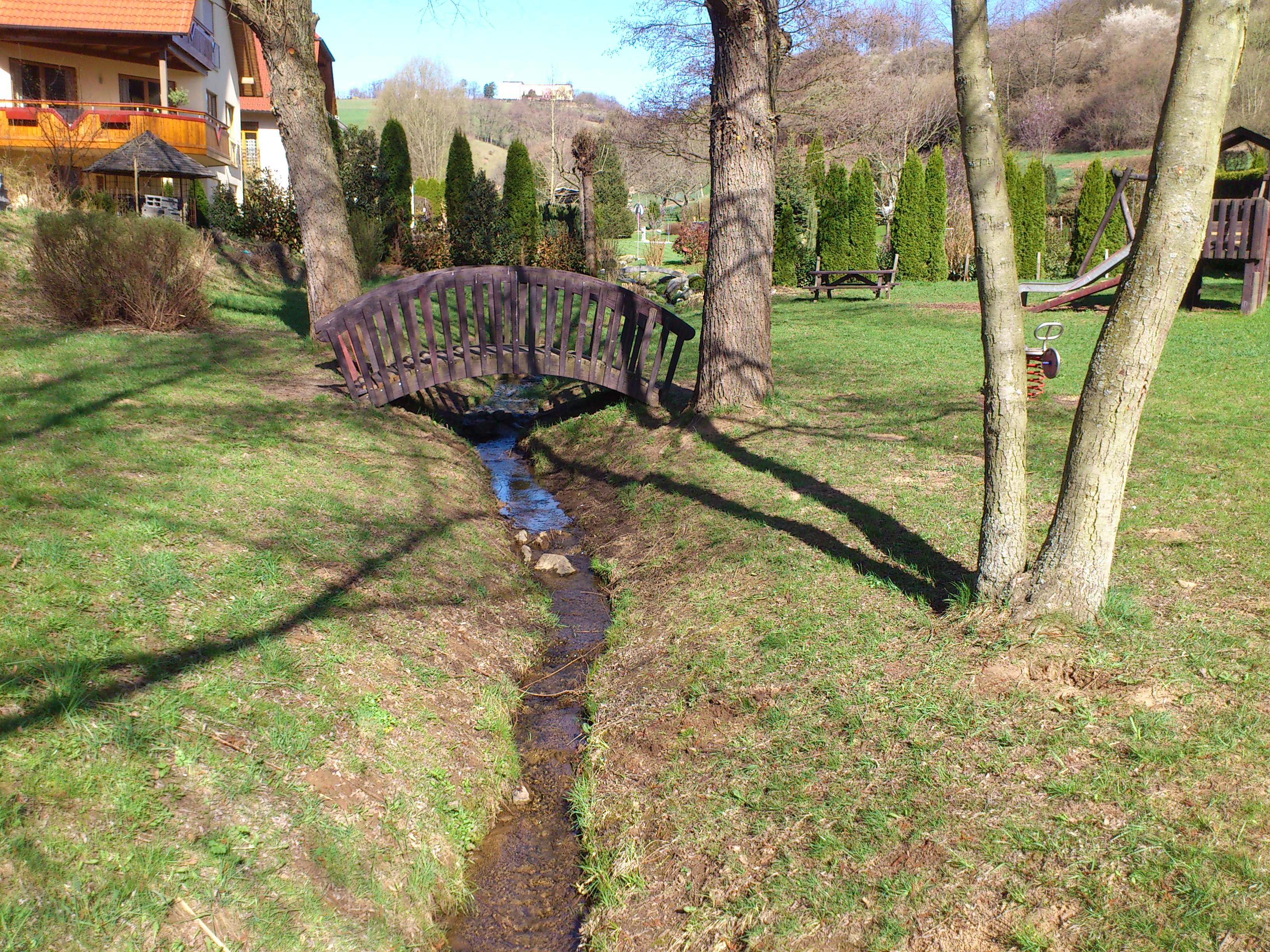 Der Hirschbach in Straßbessenbach